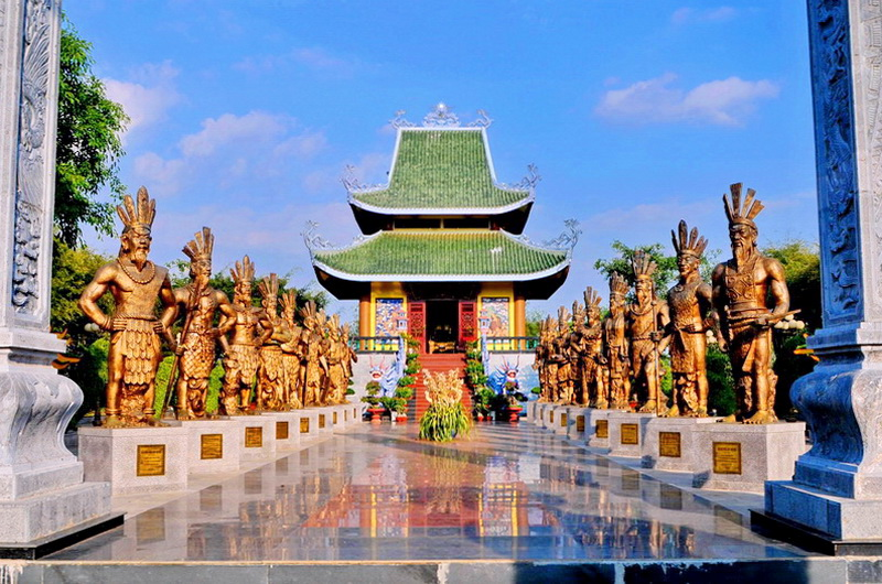 ĐỀN THỜ QUỐC TỔ HÙNG VƯƠNG